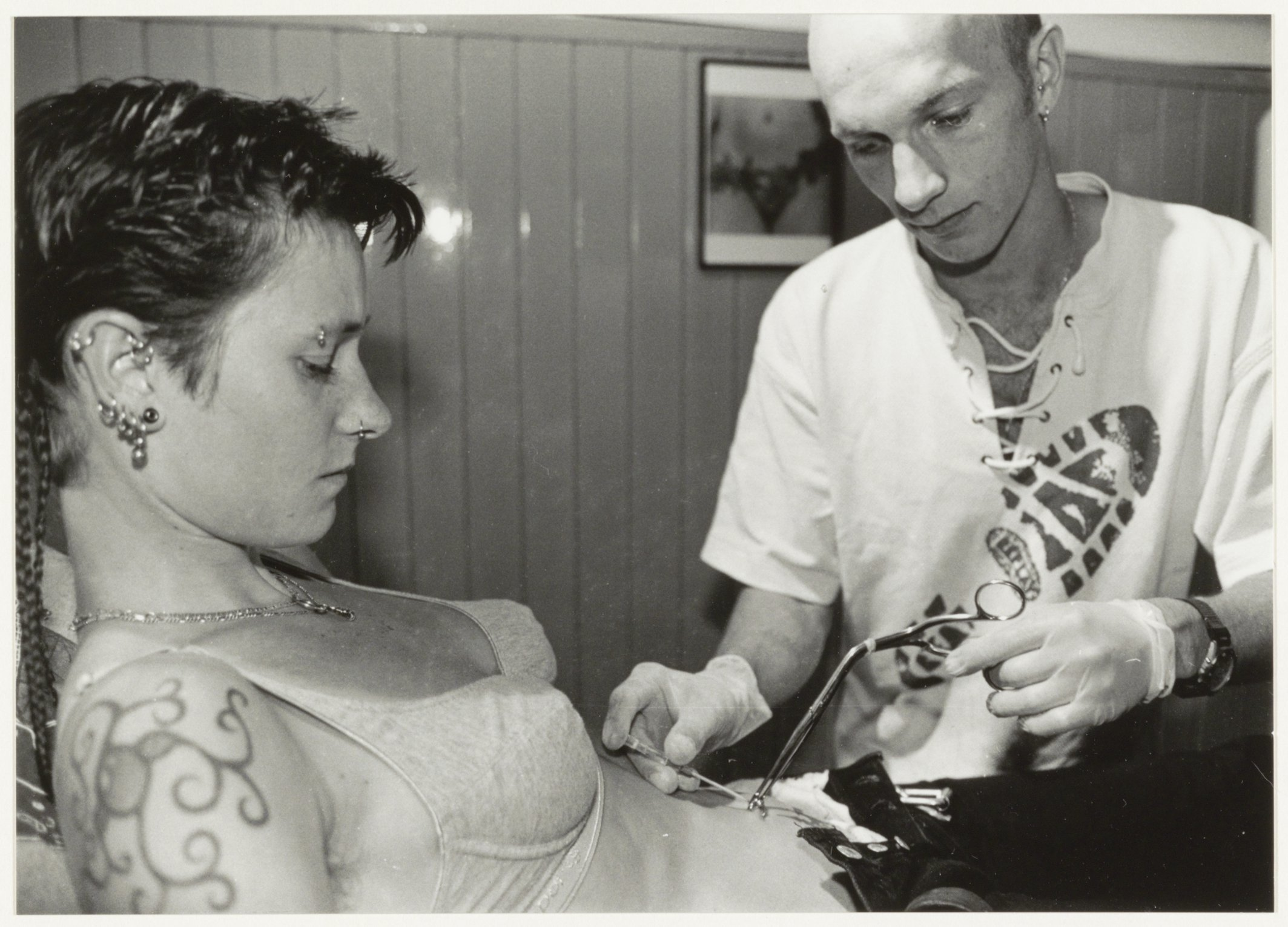 CollectieCollectie Fotoburo de BoerInventarisnummerNL-HlmNHA_54037207NL-HlmNHA_1478_44453KBeschrijving'Rings of pleasure' Piercing Studio in de Schagchelstraat. Foto: Eigenaar Rob van Rijn plaatst een navelpiercing bij Saskia Harman.FotonummerNL-HlmNHA_1478_2955DocumenttypeHistorieprenten, tekeningen en foto'sSoort vervaardigerFotograaf Interieur/ExterieurInterieurAnnotatiesD59.1 HD050897PersonenRijn, Rob vanHarman, Saskia Functies personenPiercings LandNederland ProvincieNoord-Holland GemeenteHaarlem PlaatsHaarlem StraatSchagchelstraat GeografischCentrum Begindatum05-08-1997Einddatum05-08-1997Datering gebeurtenis05-08-1997TechniekFoto TrefwoordenPiercing